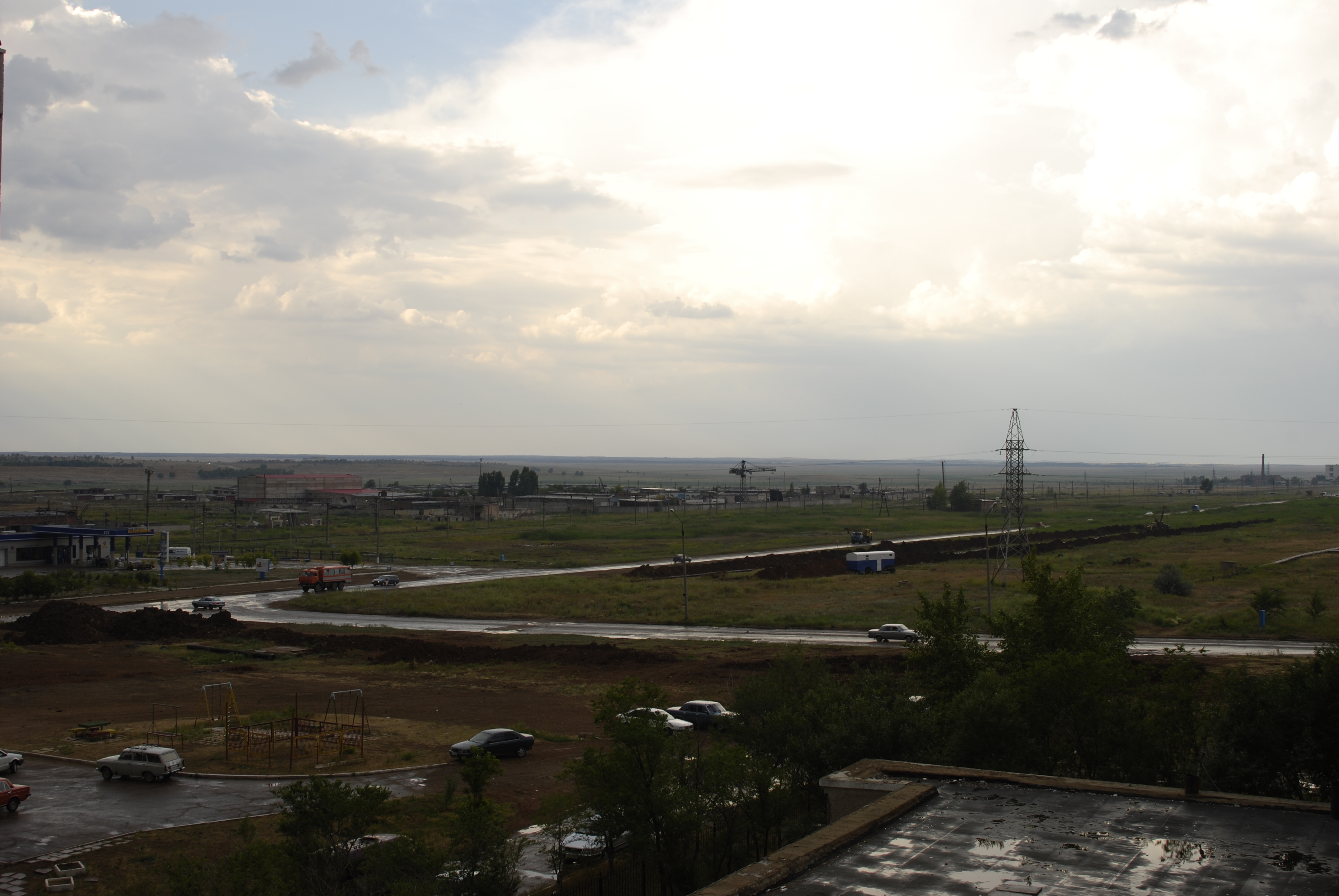 Степногорск, окраина города